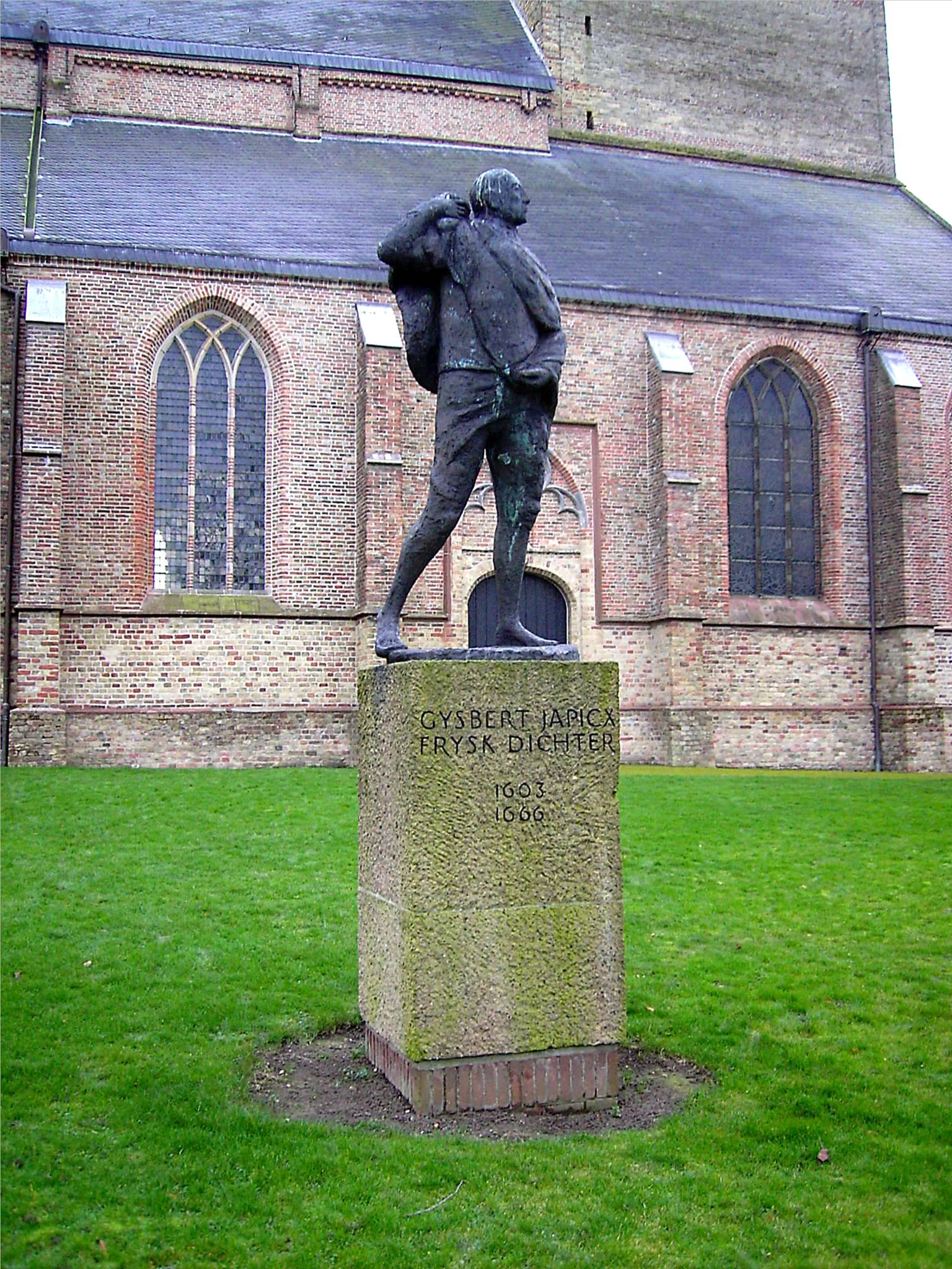 Wilfried Put,1966